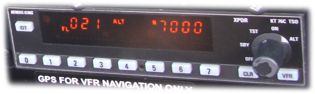 Un Transpondeur Bendix/King sur Aquila AT01 en fonctionnement.